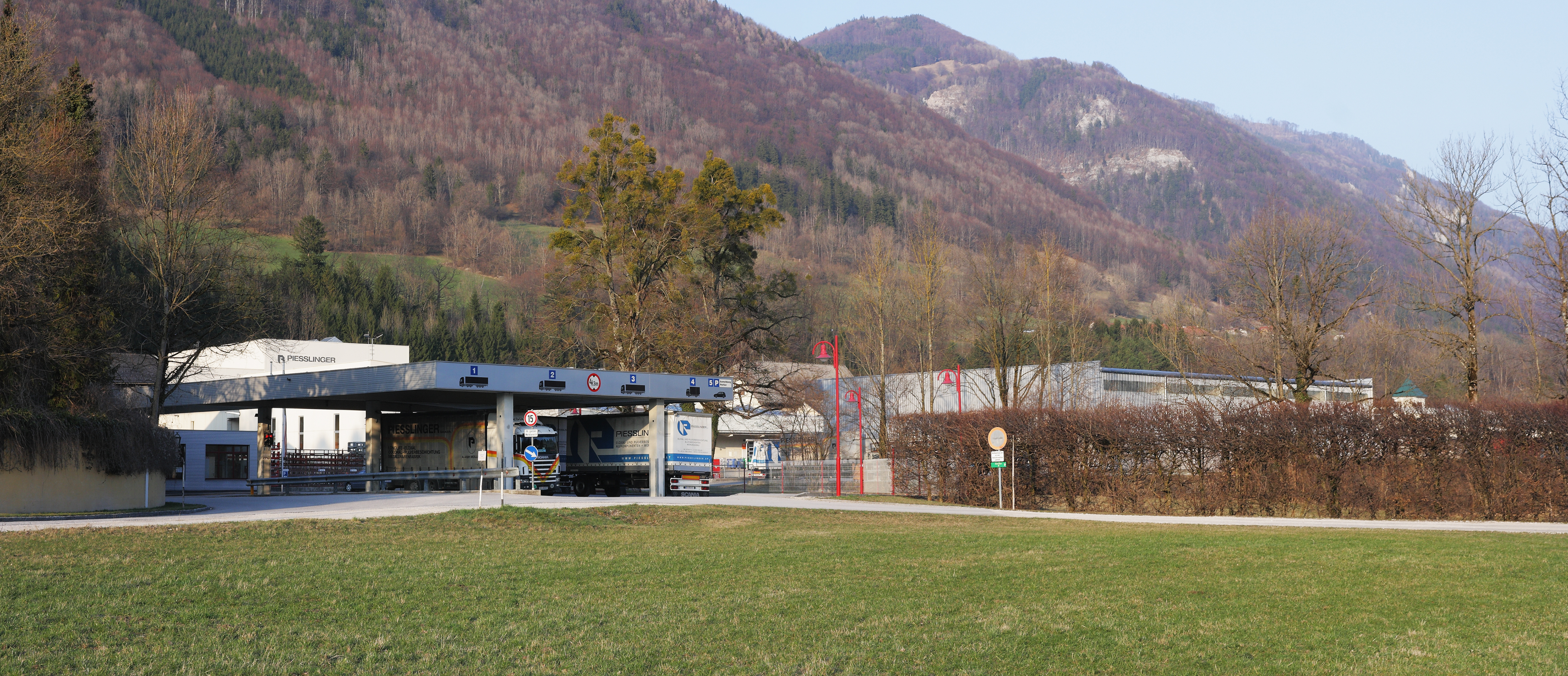 Das Piesslingerwerk in Molln, Oberösterreich (Im Gstadt 1)